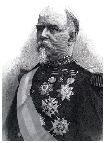 Corresponde al general Azcárraga dar el paso definitivo para la organización divisionaria permanente del Ejército de la Península e Islas adyacentes.